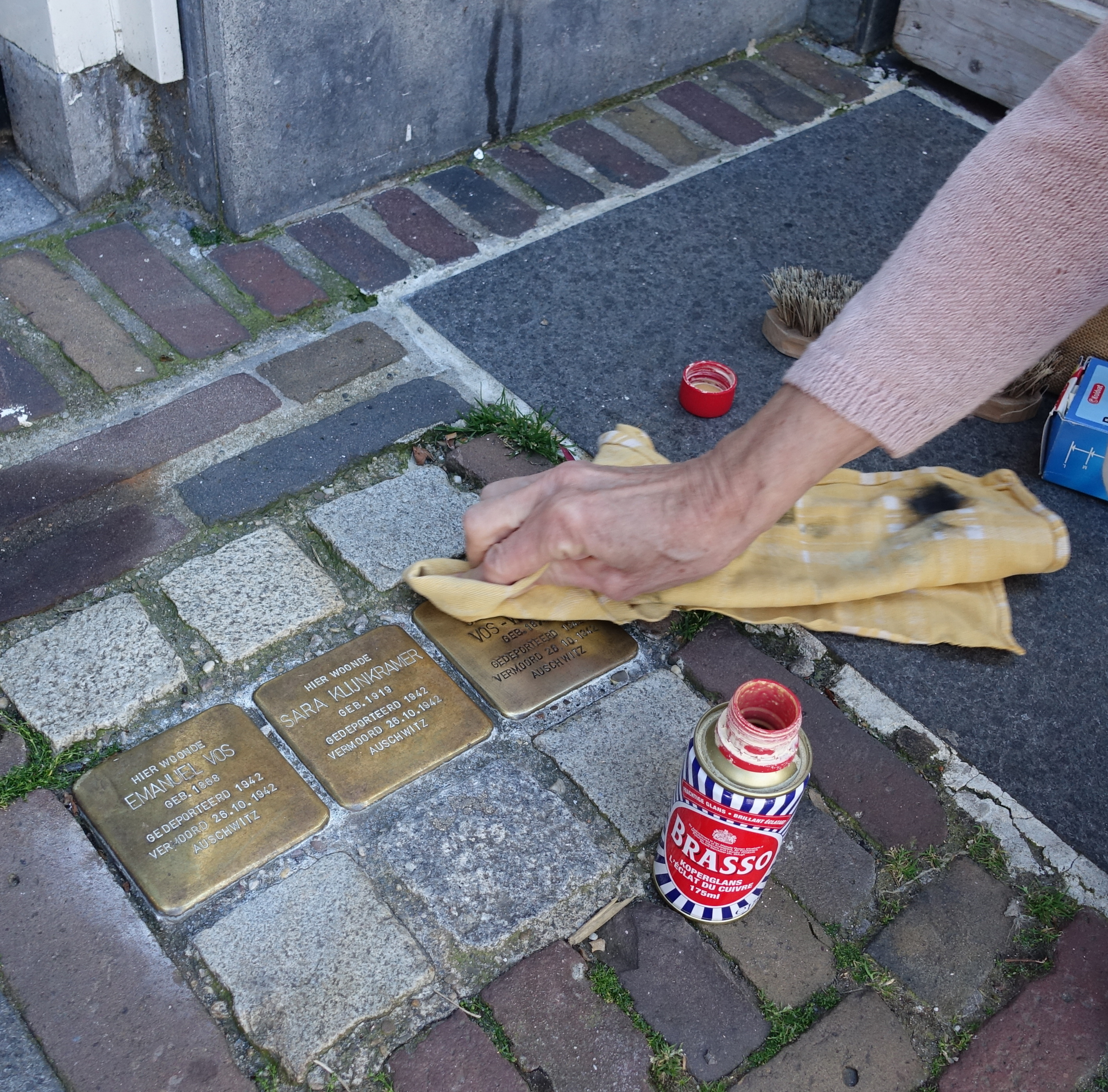 Stolpersteine in Oudewater